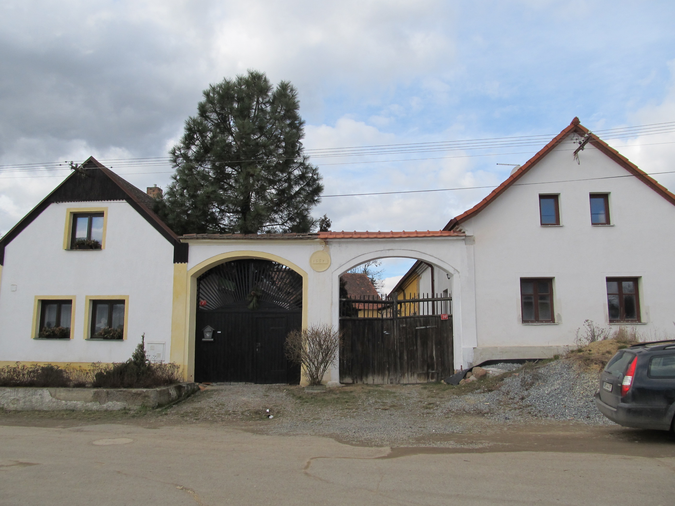 Kamenný Újezd - statek č.p. 36